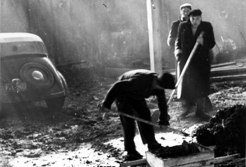 Poln. Juden beim reinigen einer Garage in Krakau (B.d.O)